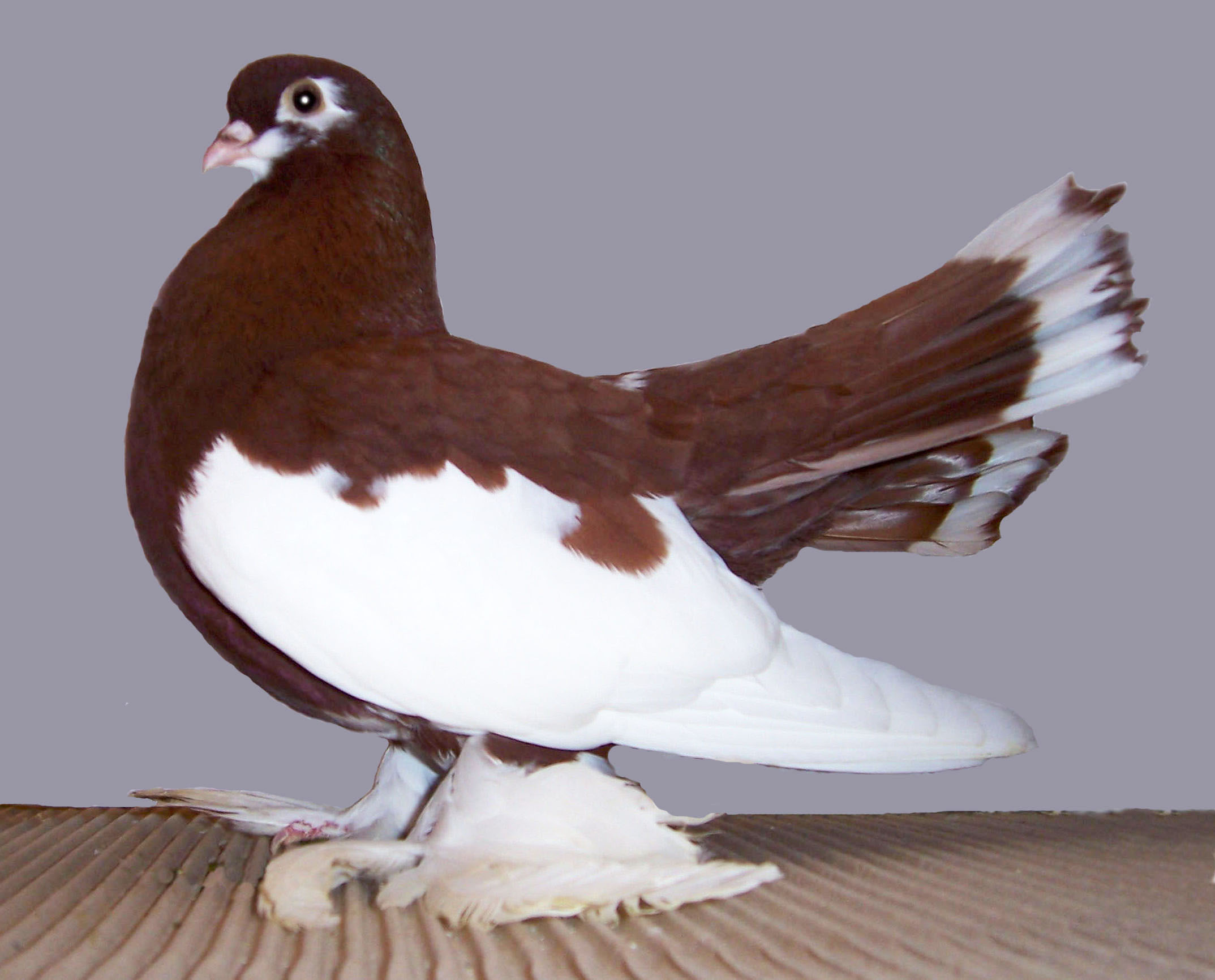 Syrian Sabuni Tumbler Volga Tumbler (Red Startail)